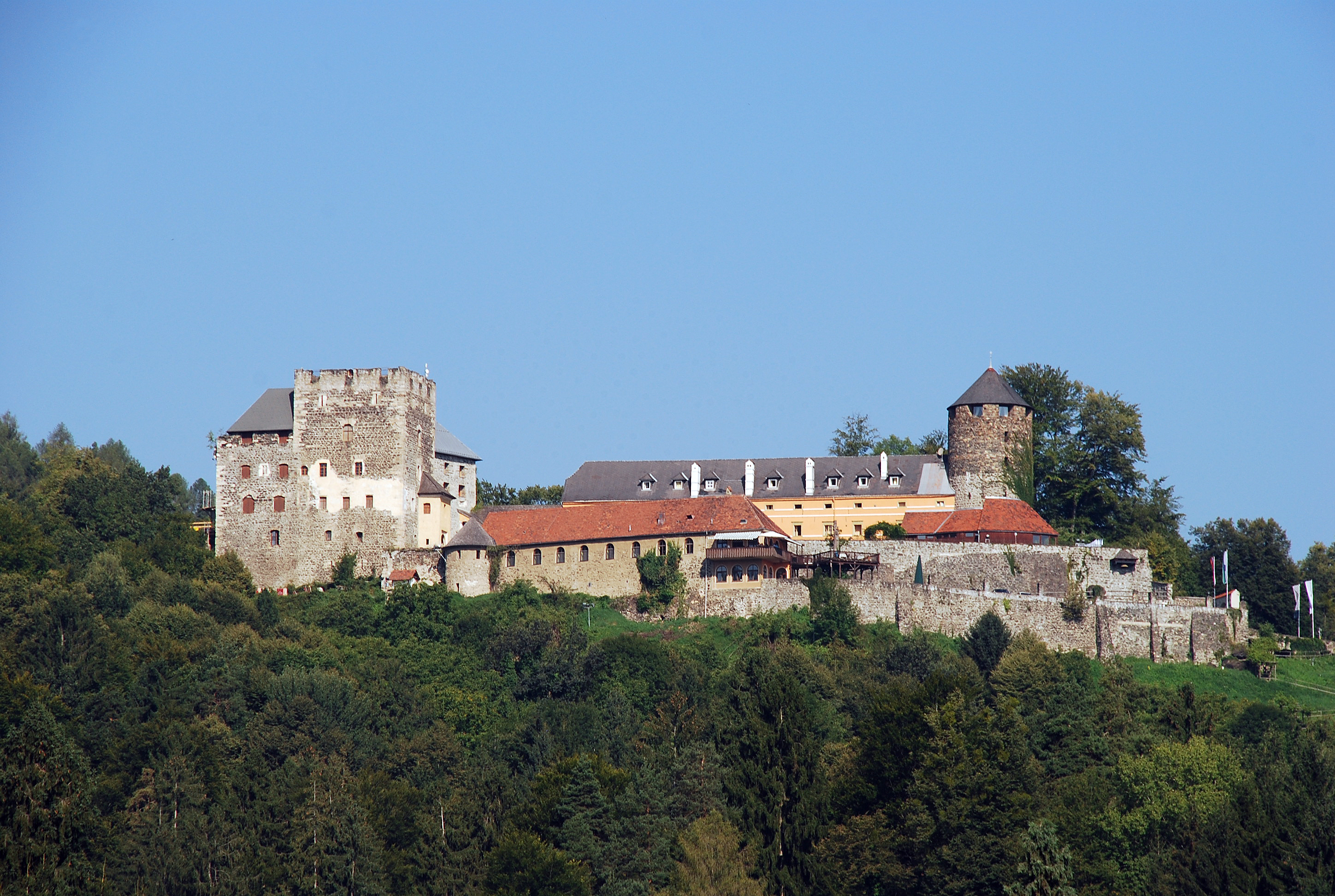 Burg Deutschlandsberg von Leibenfeld aus, Weststeiermark, Austria